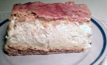 En Napoleonbakelse av enklare snitt. Notera att endast 2 plattor smördeg används, något som är vanligt för att minimera tillverkningskostnaden.